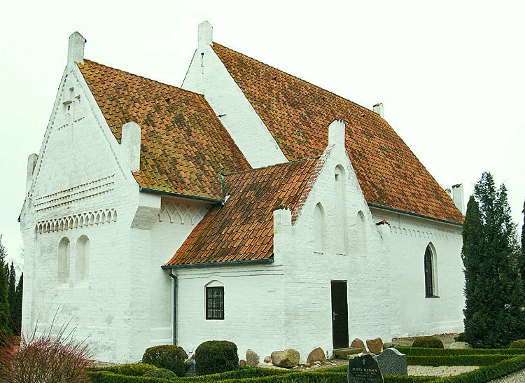 fra nordøst